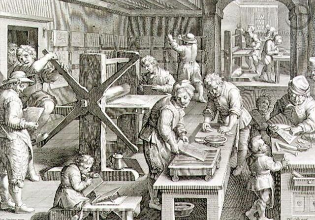 Uitvinding van kopergravure